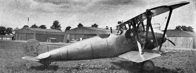 Letov Šm-1 s motorem Breifeld & Daněk (1920)